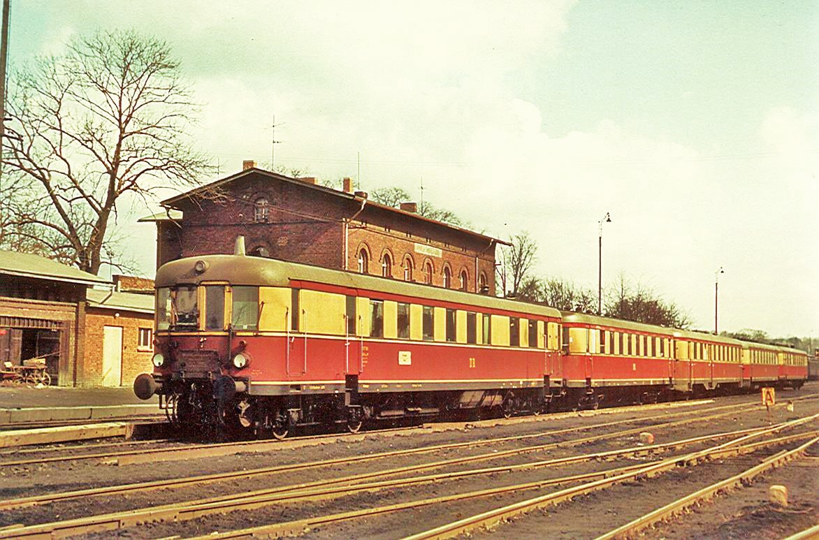 Triebwagenzug mit VT 137 Eilzugwagengrundriss im Bahnhof Hirschfelde, fotografiert von Georg Otte